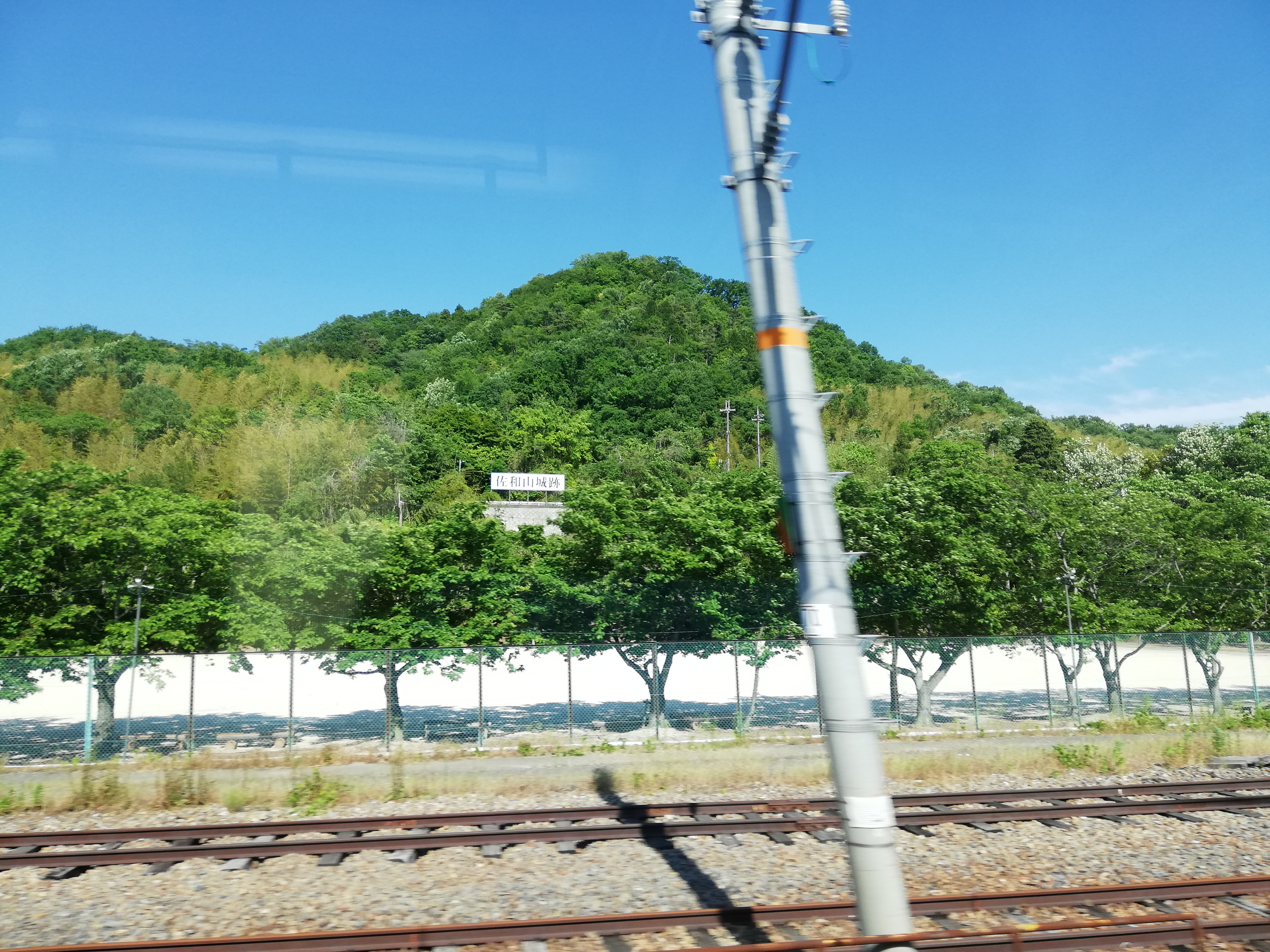 JR琵琶湖線米原行の車窓から撮影した佐和山。